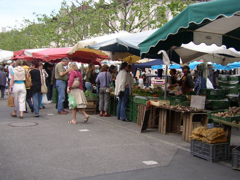 Marché sur la place du marché de Carouge